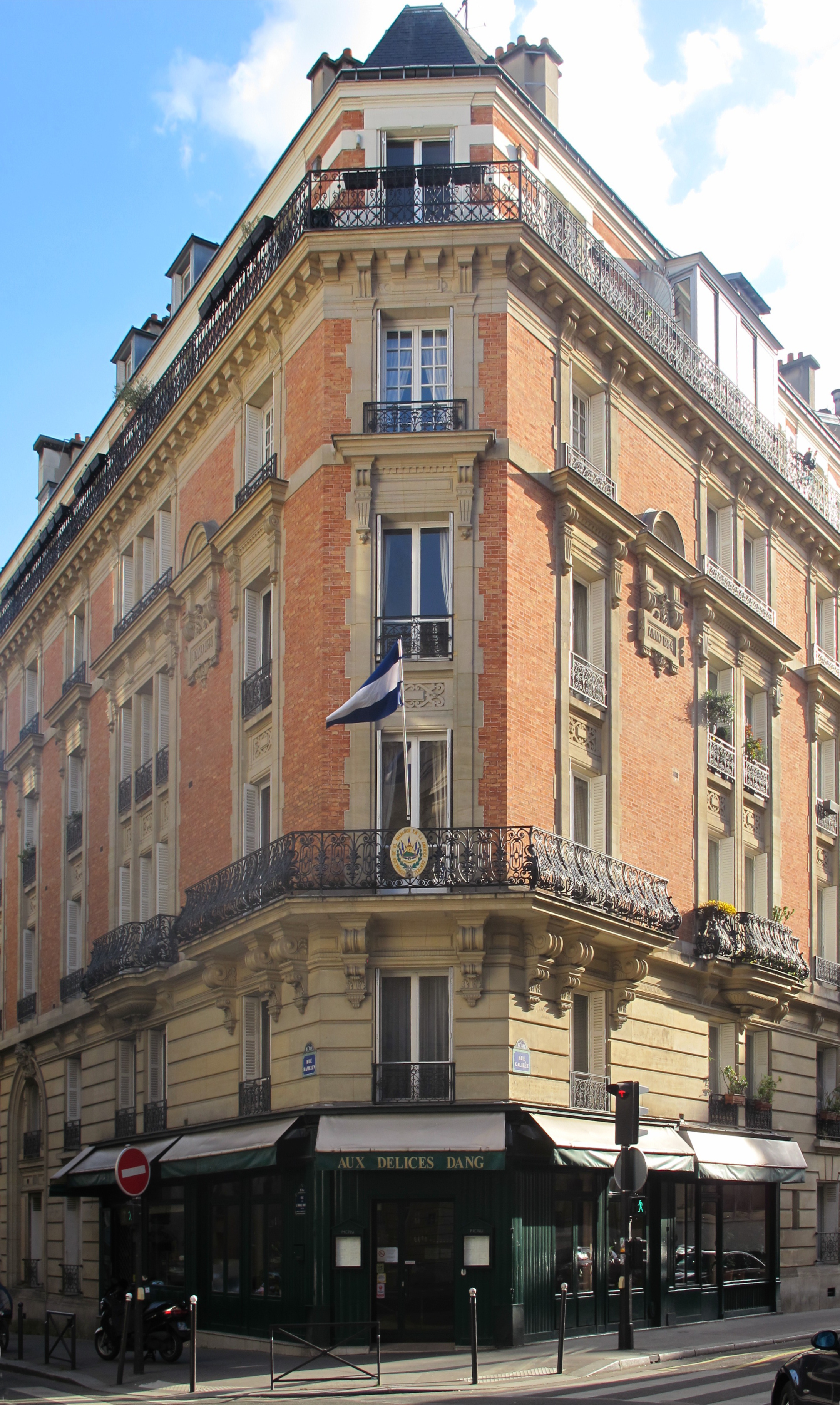 Ambassade du Salvador en France, 12 rue Galilée (Paris, 16e).